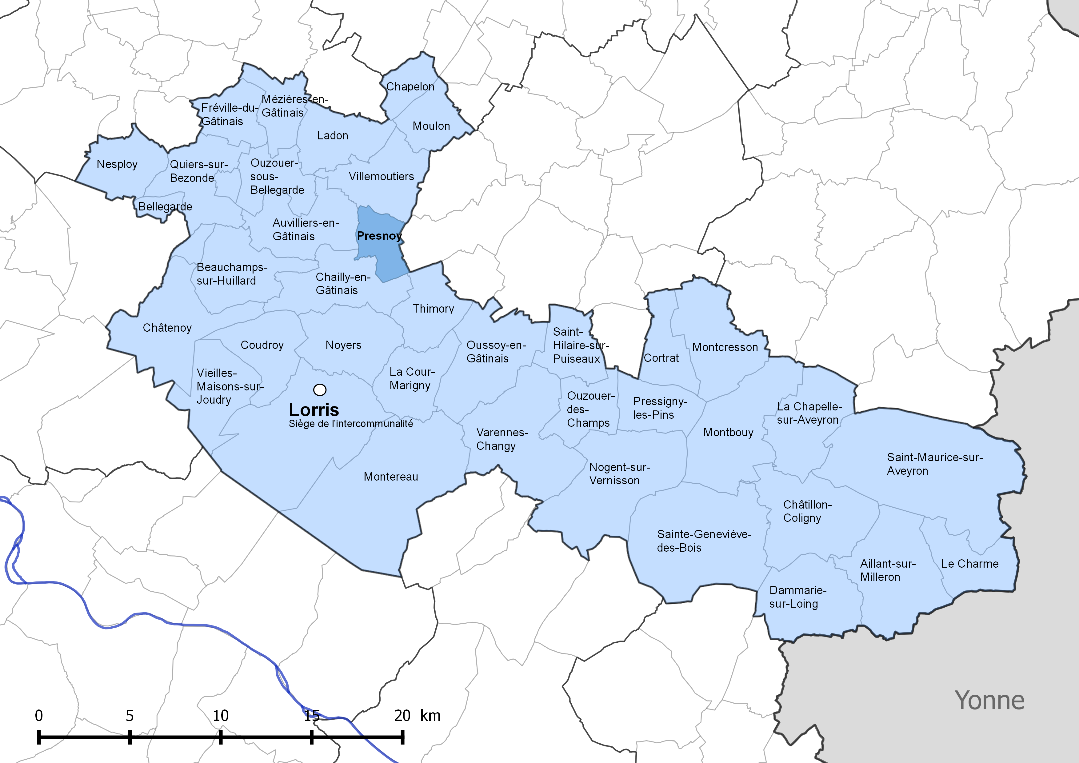 Périmètre de la communauté de communes Canaux et forêts en Gâtinais - Situation de la commune de Presnoy.